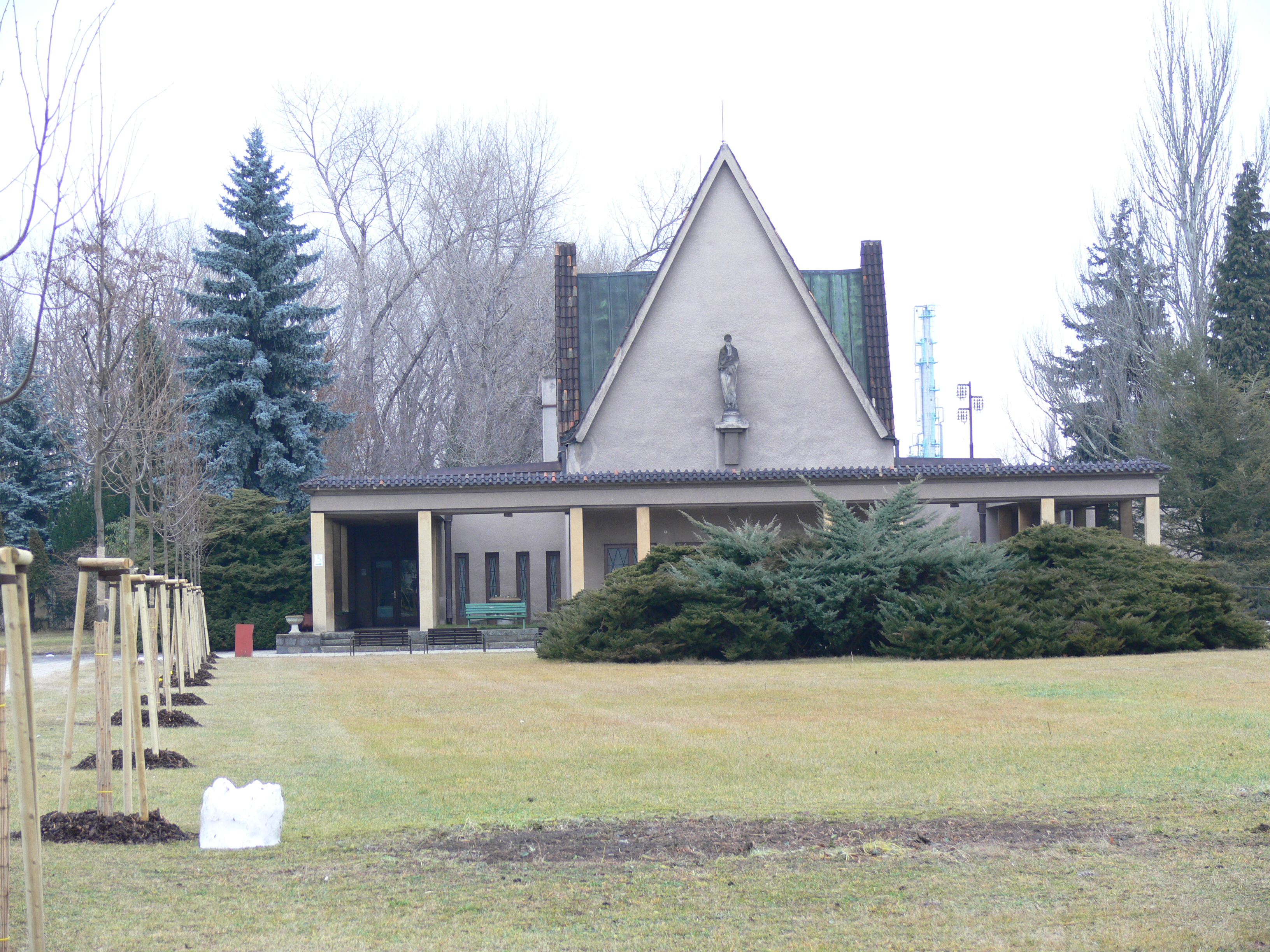 Obřadní síň hřbitova v Kolíně